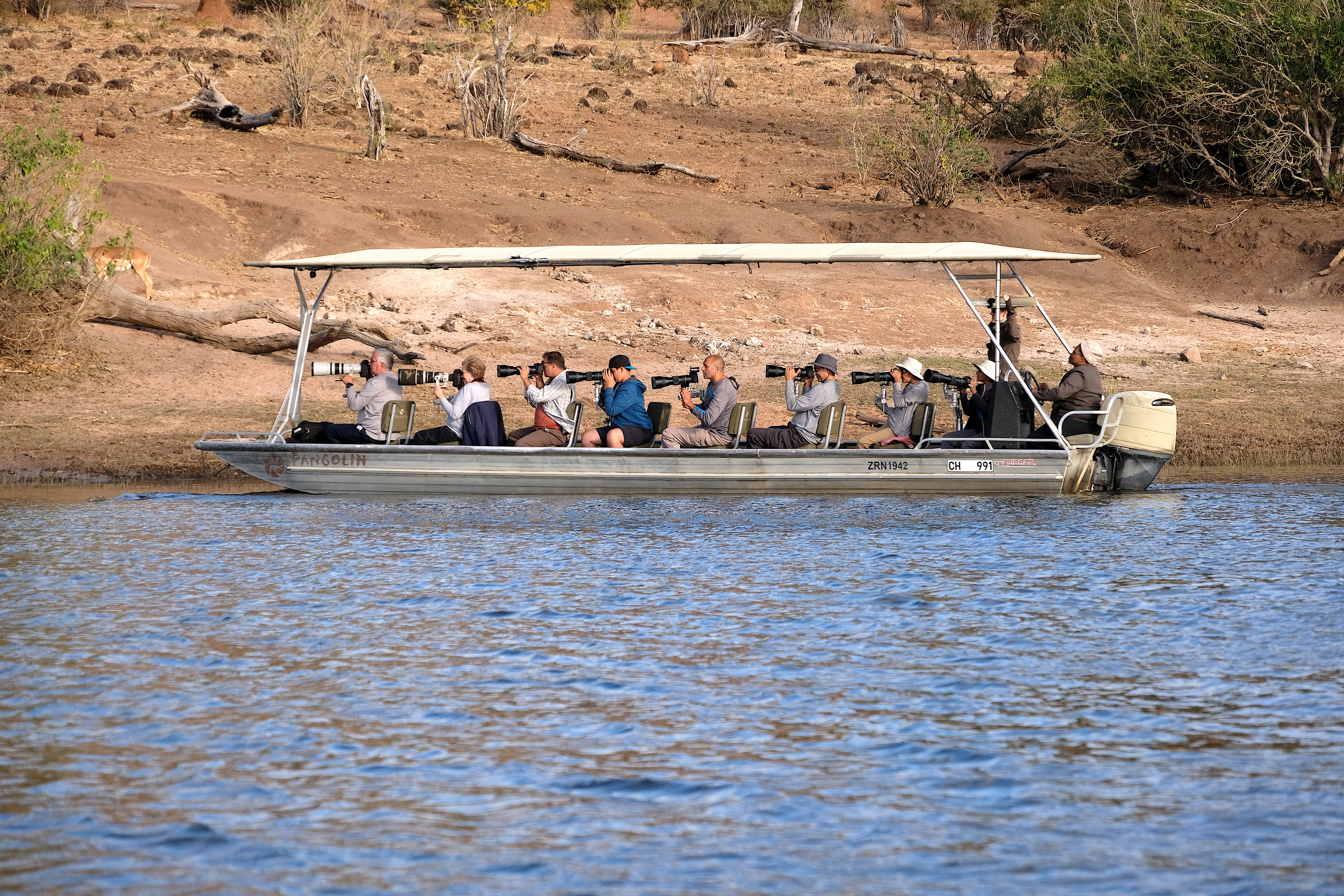 Hobby Fotografen (2018)